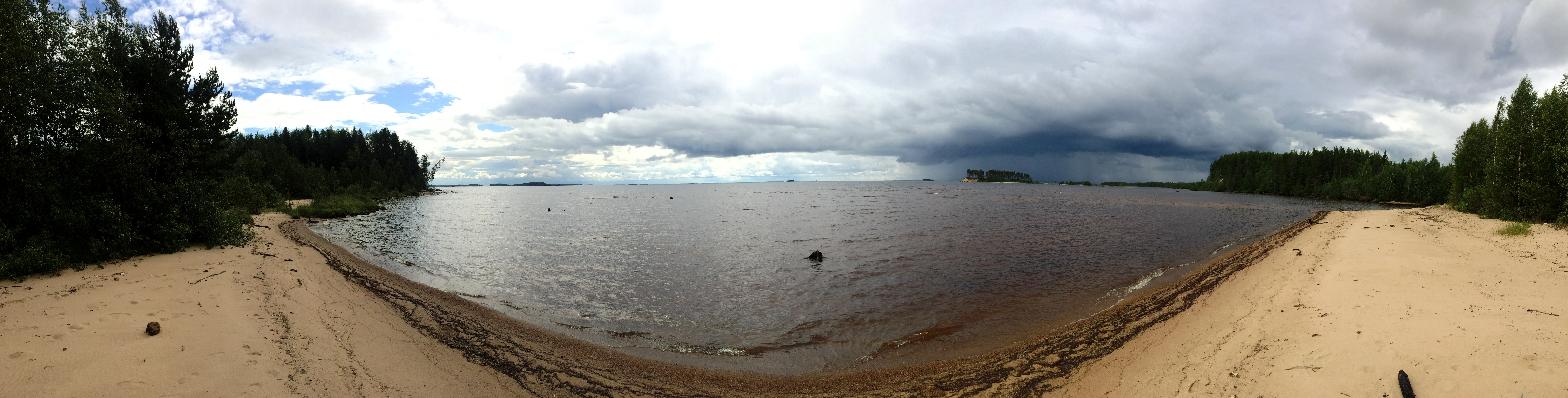 Выгозеро